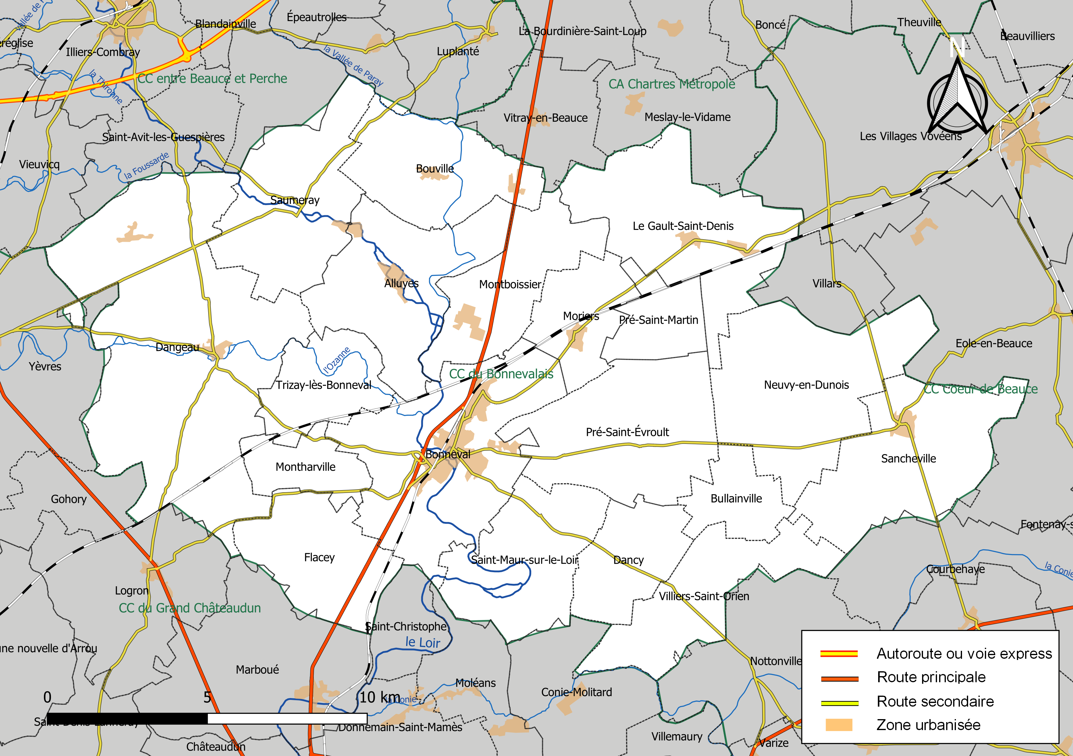 Carte géographique de la communauté de communes du Bonnevalais, département d'Eure-et-Loir, France. Composition au 1er janvier 2019.